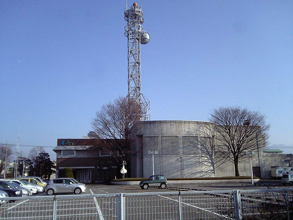 テレビ山梨本社